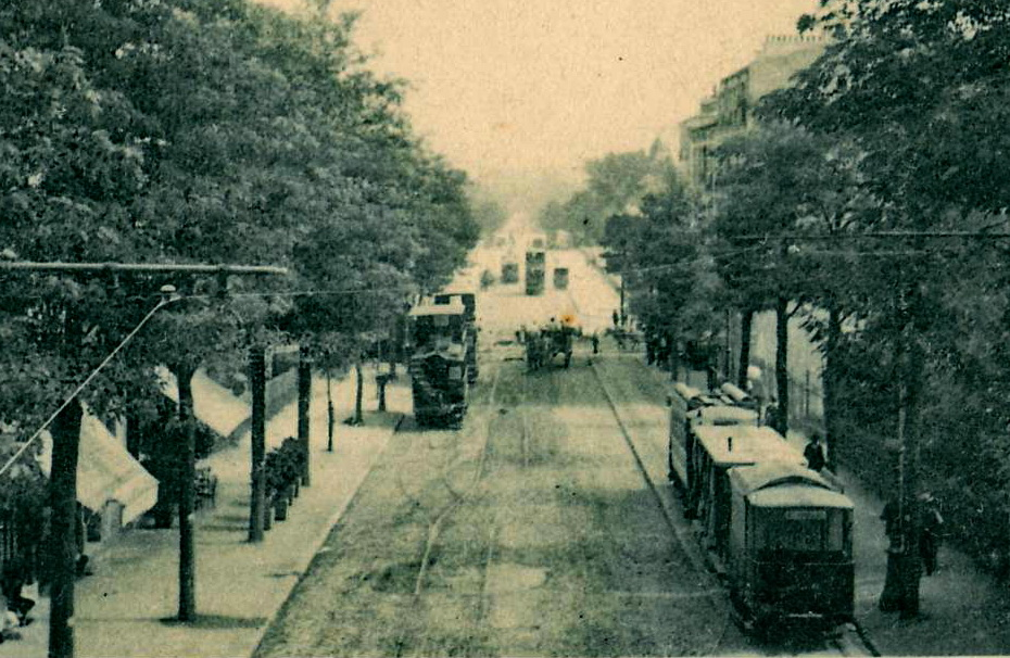 Détail d'une carte postale ancienne éditée par HenryCOURBEVOIE : Le Pont de Courbevoie